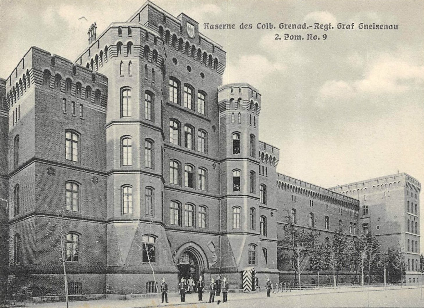 Garnizon Stargard. Czerwone koszary